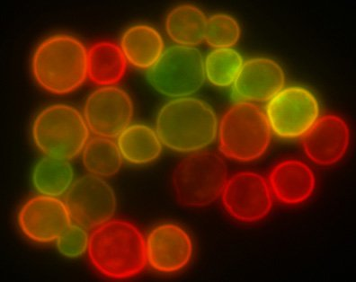 پیکربندی فیلترهای اپتیکی مورد استفاده در میکروسکوپ فلوئورسانس